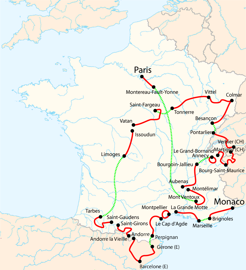 Carte du Tour de France 2009 avec les noms de villes en français. Les cours d'eau en Espagne ne sont pas réels et n'ont qu'une valeur illustrative.